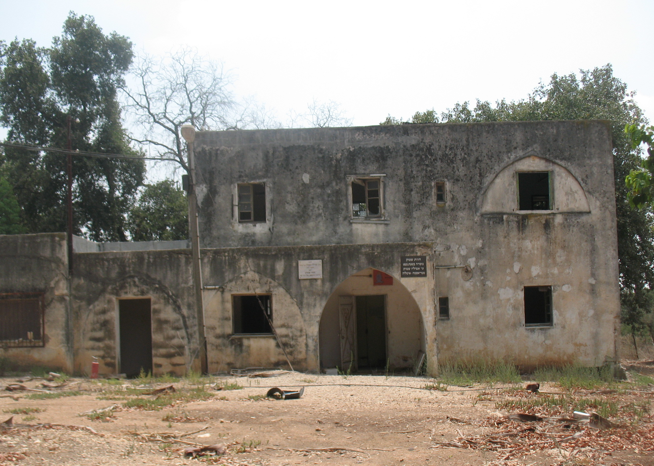 מבנה בית חוות שטוק .הוקם בשנת 1925 ושימש מבנה מרכזי של חוות שטוק שליד רמת ישי ומושב בית שערים .צילום : אלי אלון (איןלהפיץ או לפרסם תמונה זו ללא מתן קרדיט ליוצר התמונה :אלי אלון)